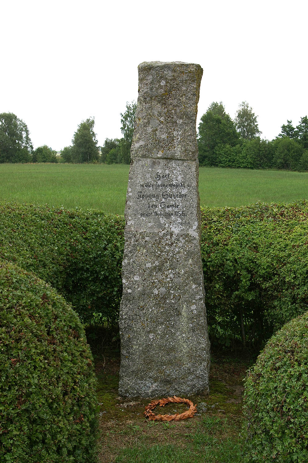 Sverkerstenen på platsen där kung Sverker d.ä. blev mördad 1156 nära Alvastra.